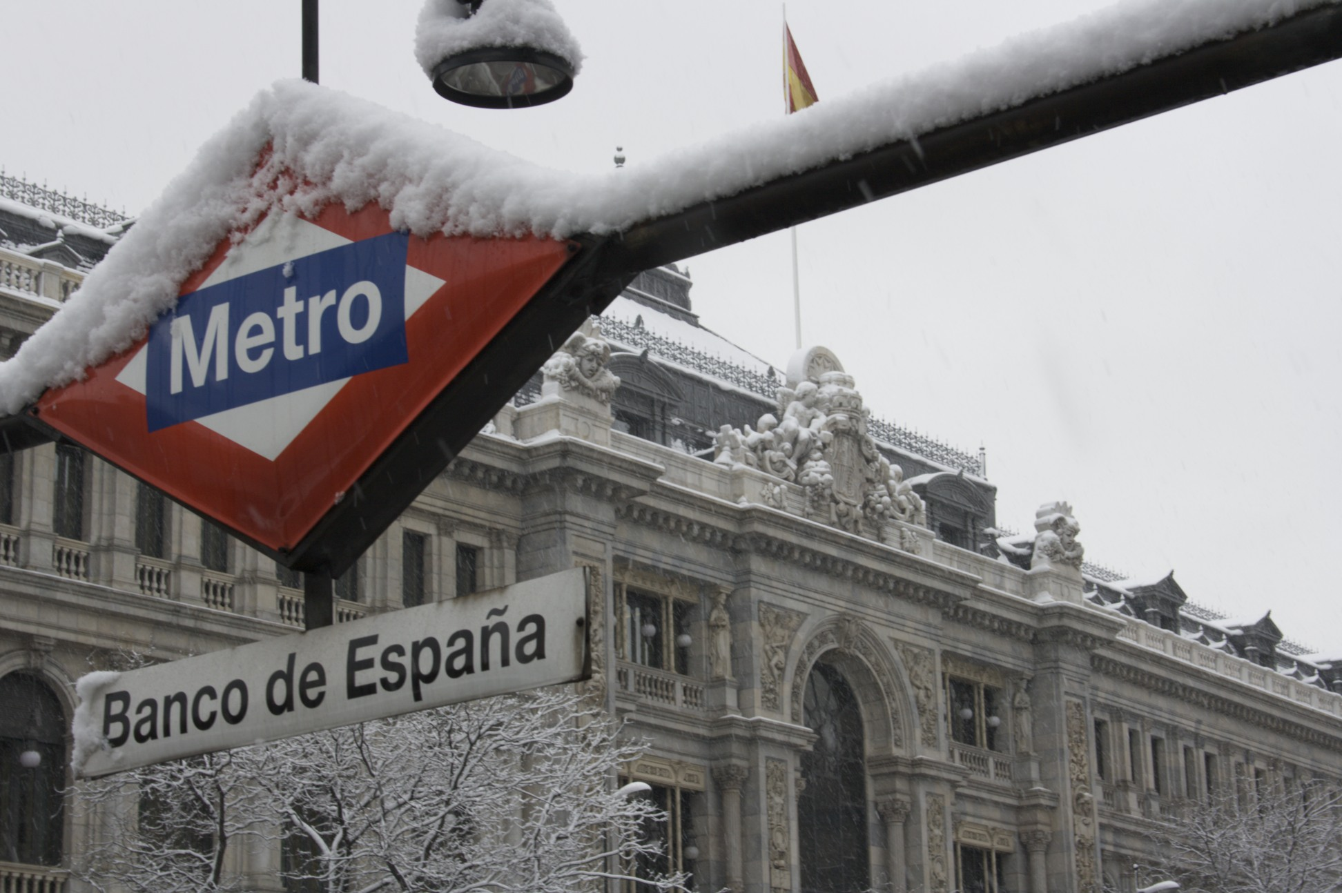 MetroBanco de España nevado